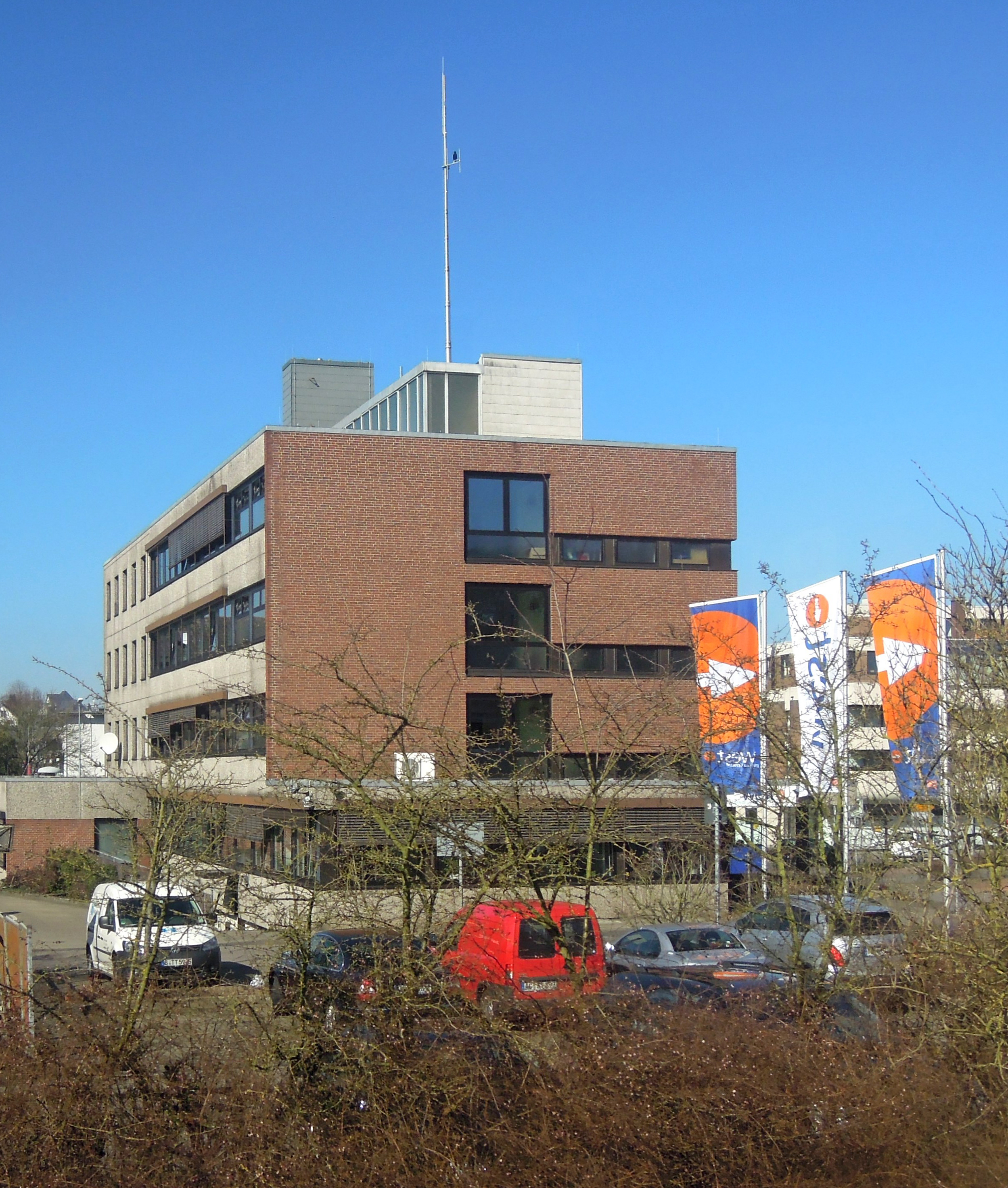 Betriebshof der West Energie und Verkehr in Geilenkirchen